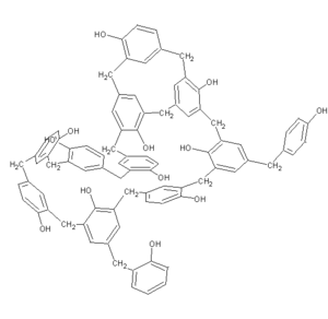 Estructura de la Bakelita